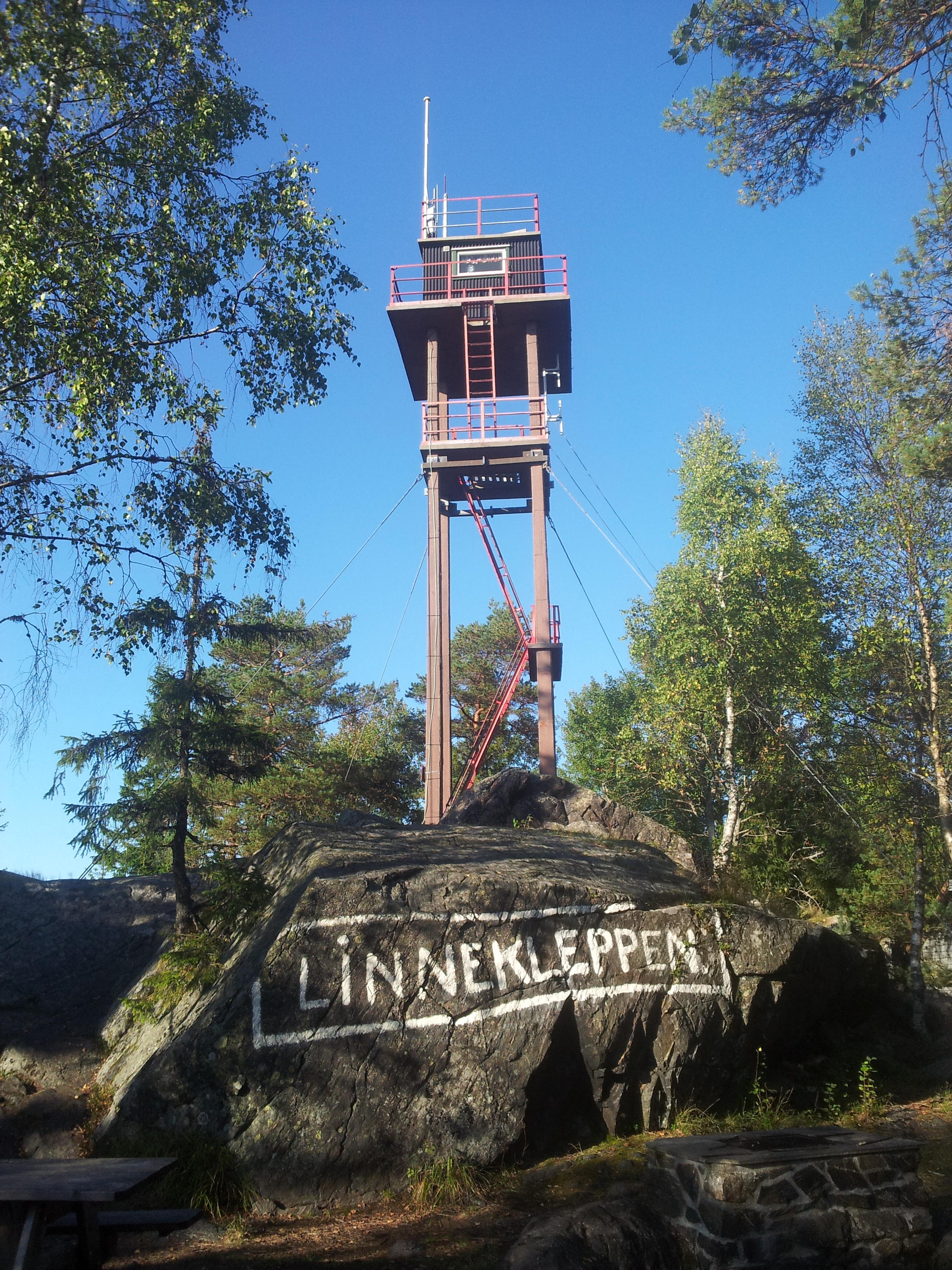 Brannvakttårnet på Linnekleppen i Østfold